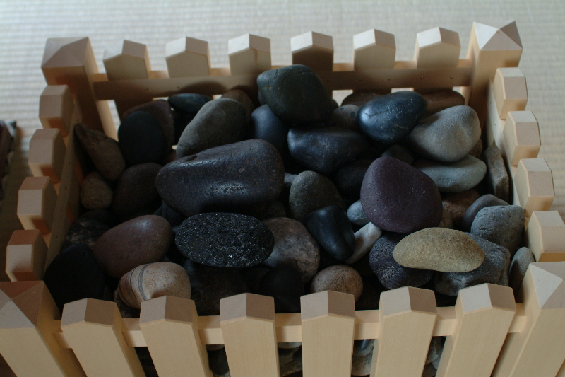 淡島神社の説明用として。